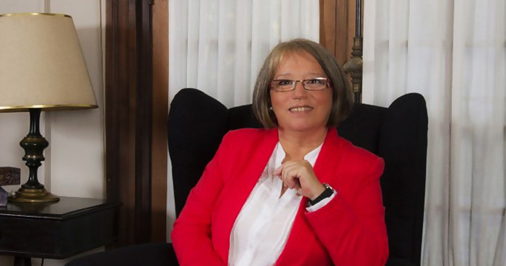 Foto de Mónica Xavier